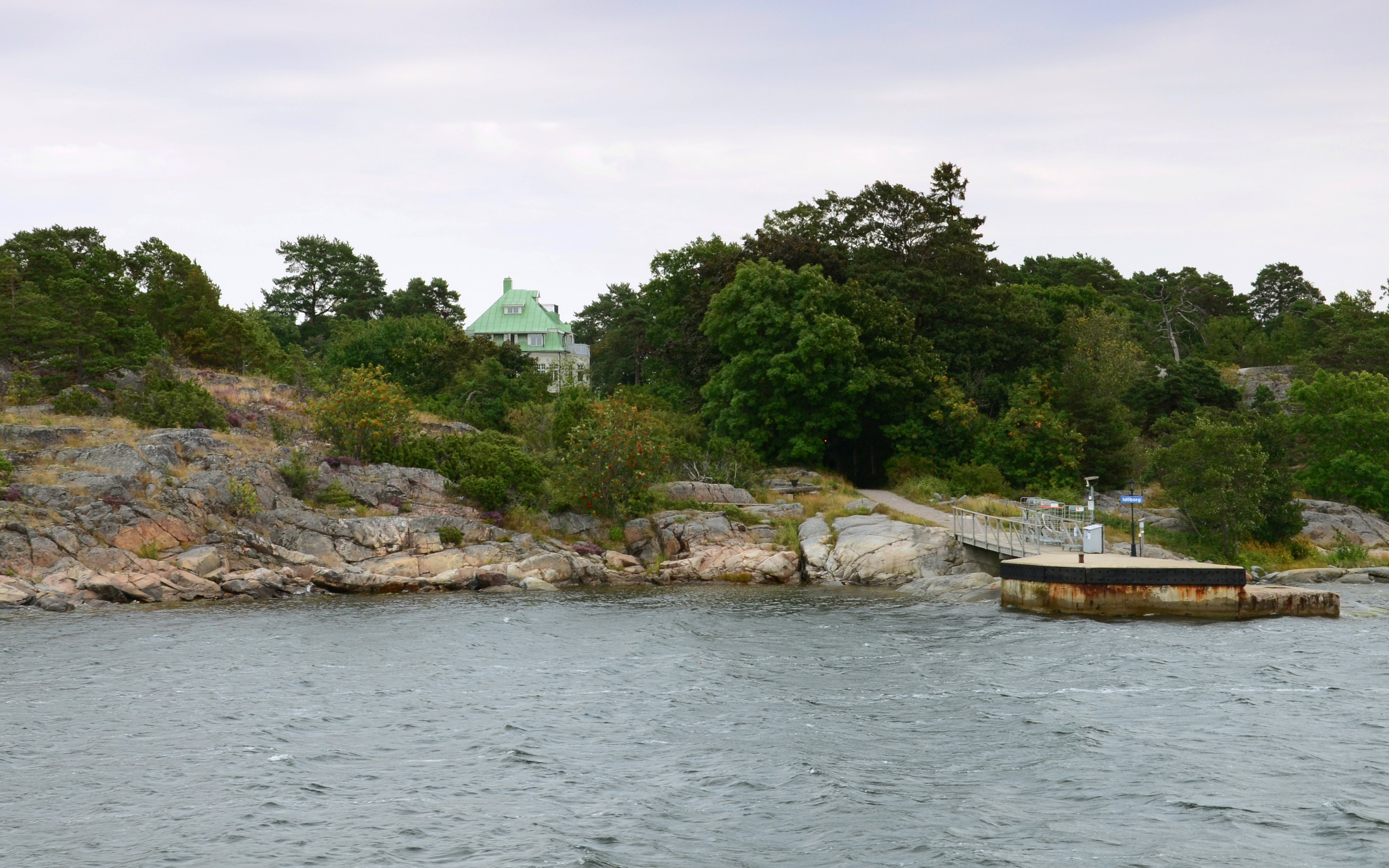 Idöborg, Rågskärsarkipelagen, Stockholms skärgård.